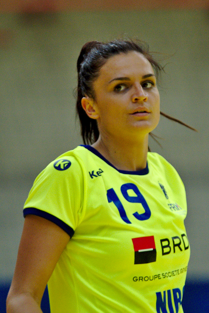 Ana Maria Dragut